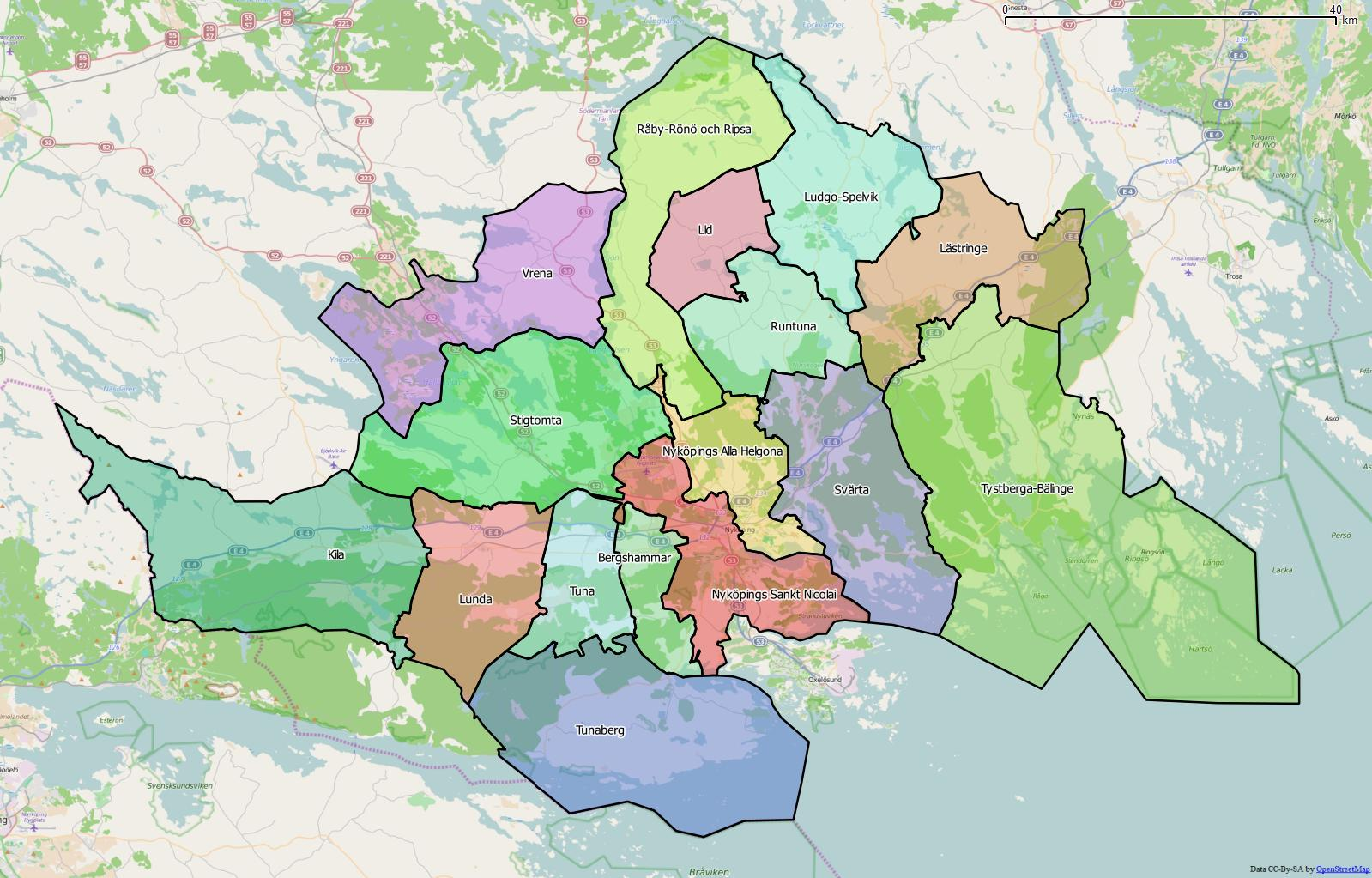 Distriktsindelningen i Nyköpings kommun World file: 103.63360775079677012 0 0 -103.63360775079677012 1804435.70782192354090512 8191373.62901182565838099